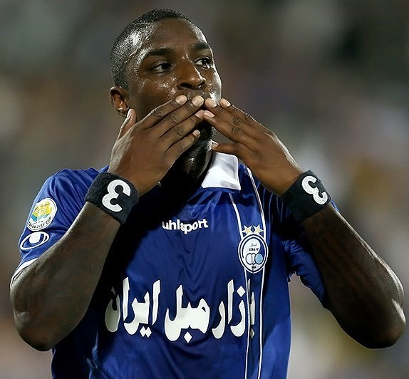 جی‌لوید ساموئل در دیدار تیم های فوتبال استقلال و راه آهن ۰۳ شهريور ۱۳۹۲